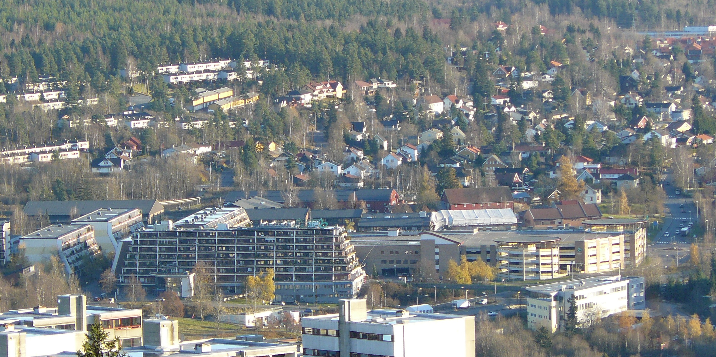 Stovner shoppingmall, Oslo